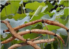 Jingtang Lotus Root's Appearance